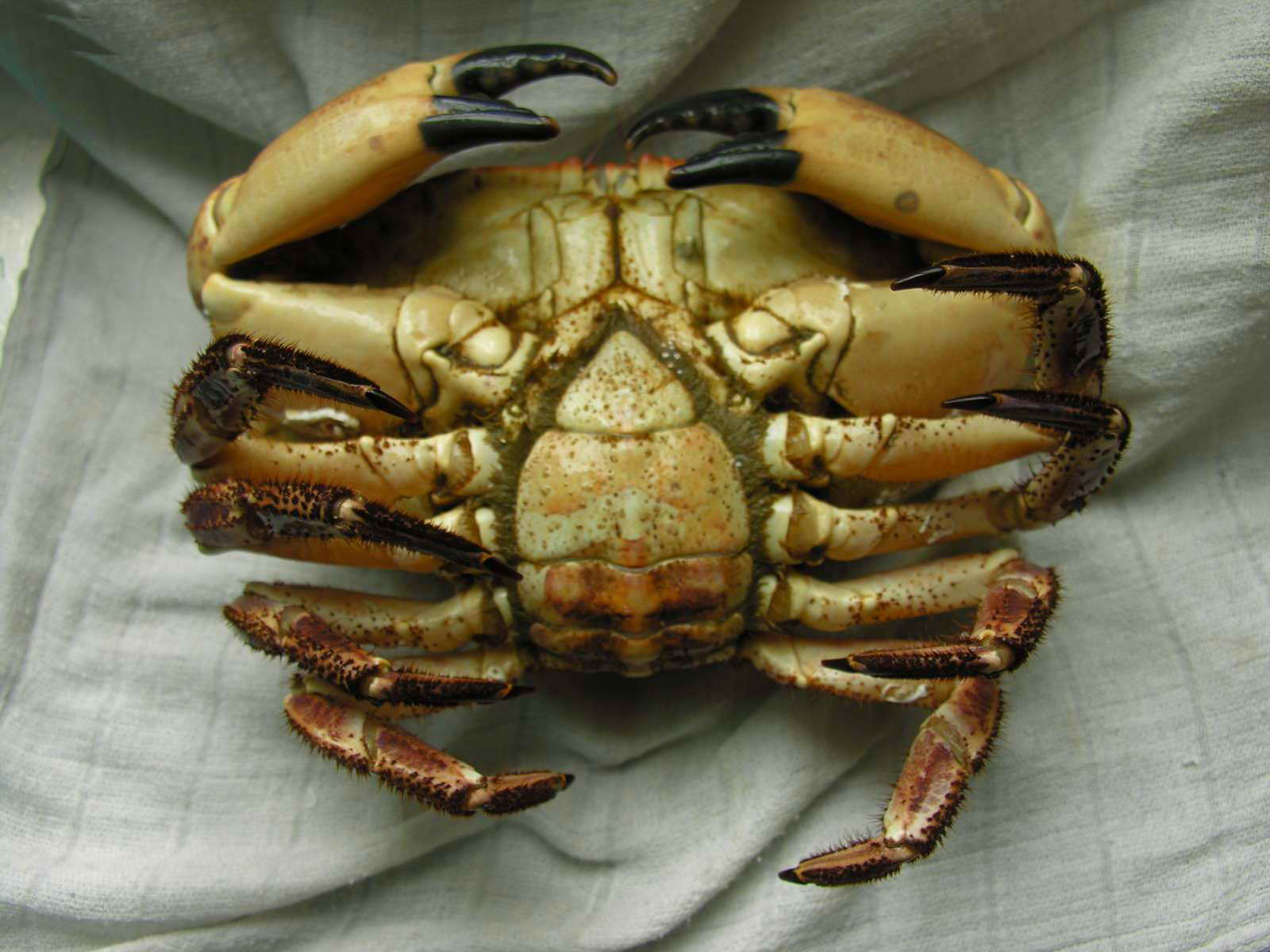 self made. Boiro - Galicia - Spain